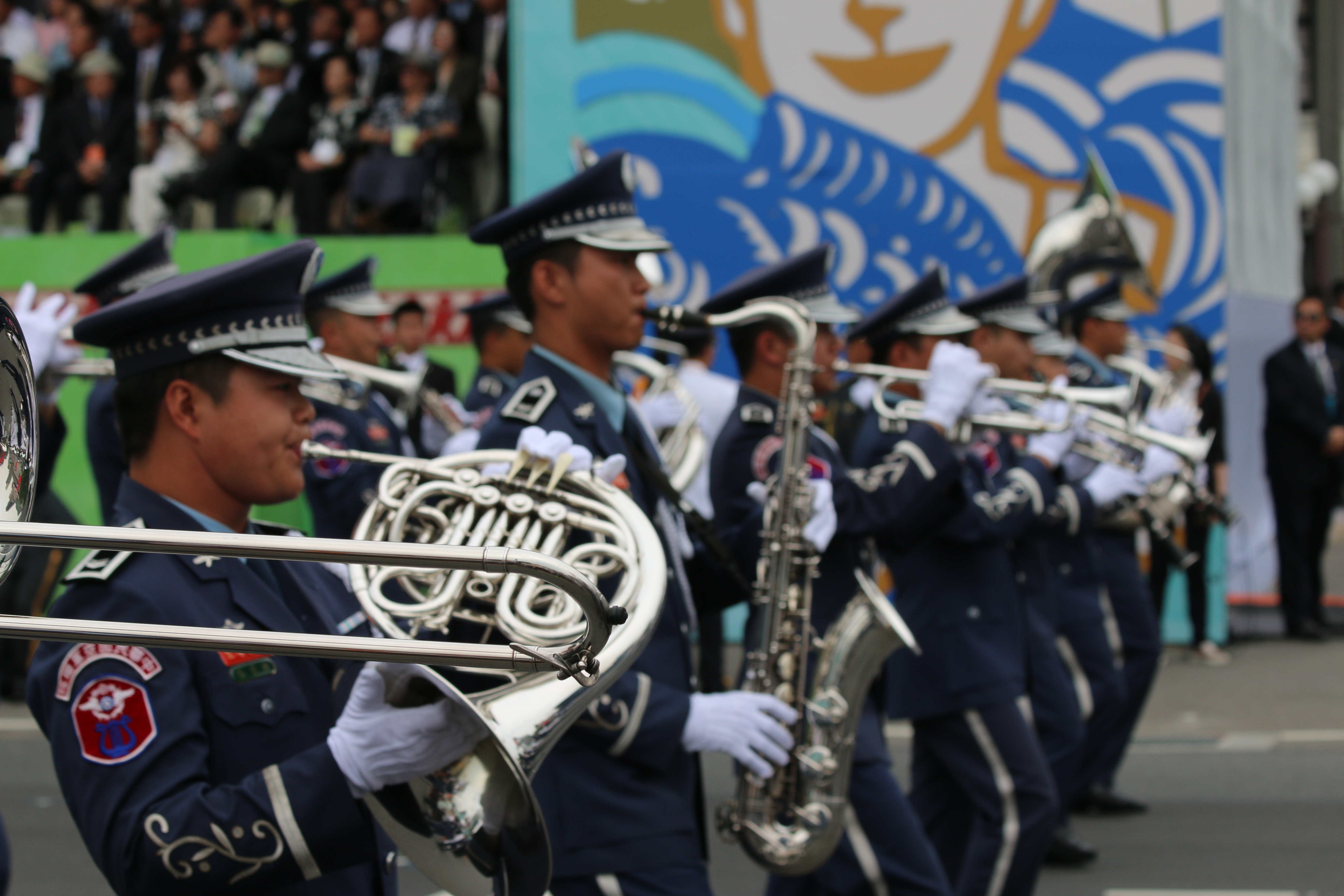 中華民國第十四任總統副總統就職慶祝大會，中華民國空軍樂隊奏樂。